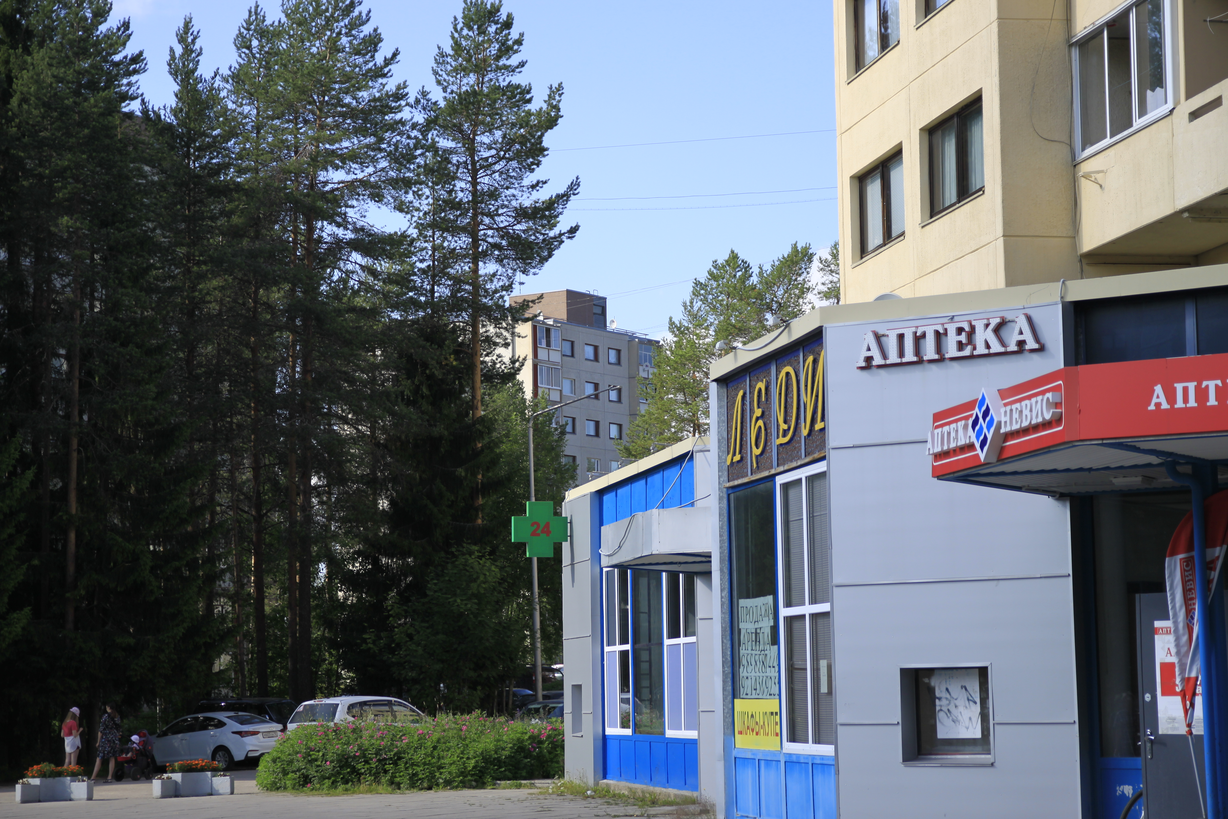 Kostamuksen ydinkeskustan kaupunkikuvalle on luonteenomaista metsälähiömäisyys